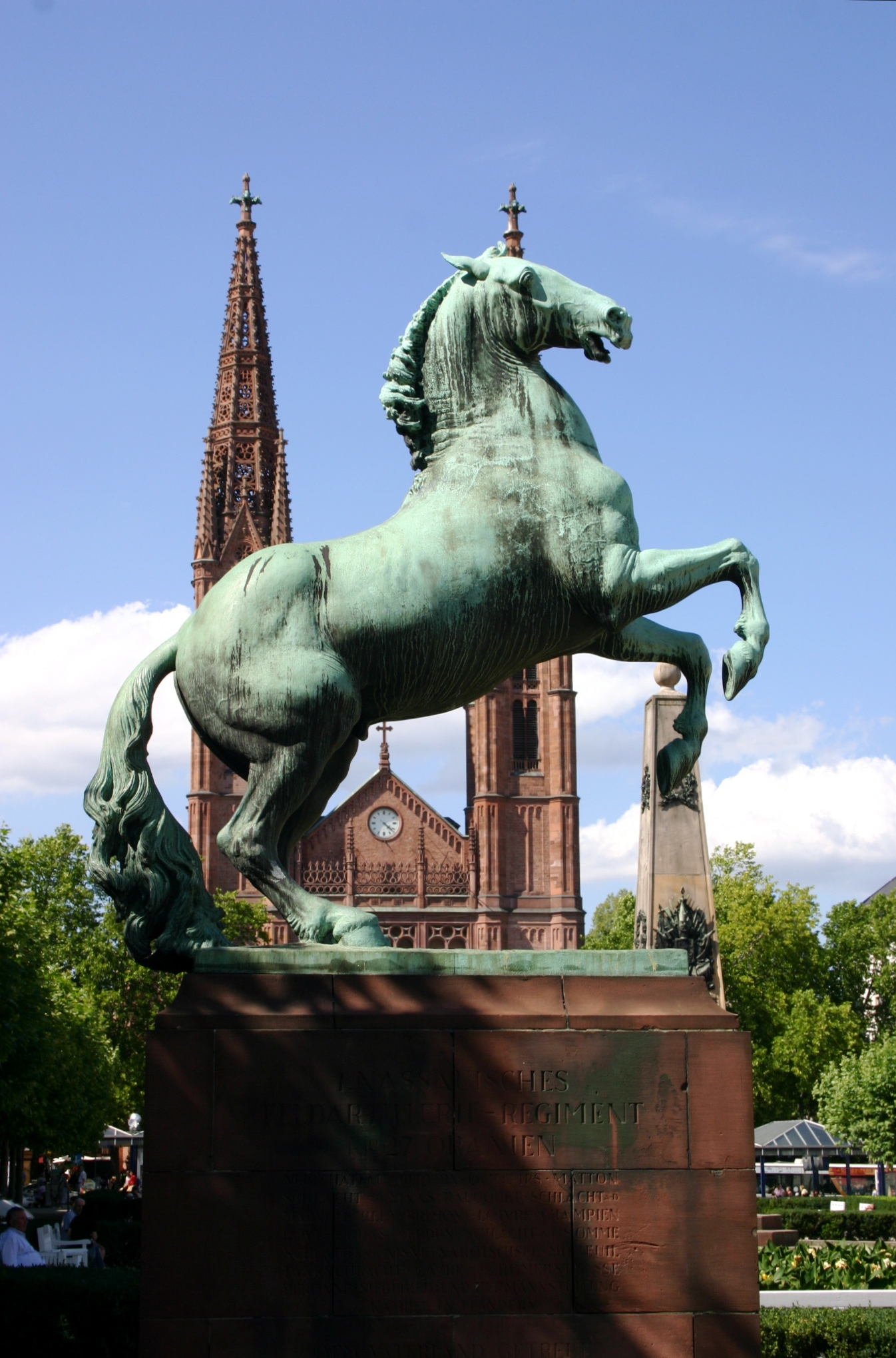 Denkmal des 1. Nassauischen Artillerieregiments Nr. 27 auf dem Wiesbadener Luisenplatz